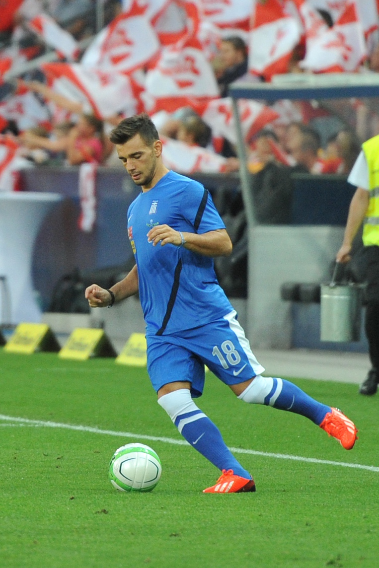 Freundschaftliches Länderspiel Österreich - Griechenland am 14. August 2013 in Salzburg: Sotiris Ninis